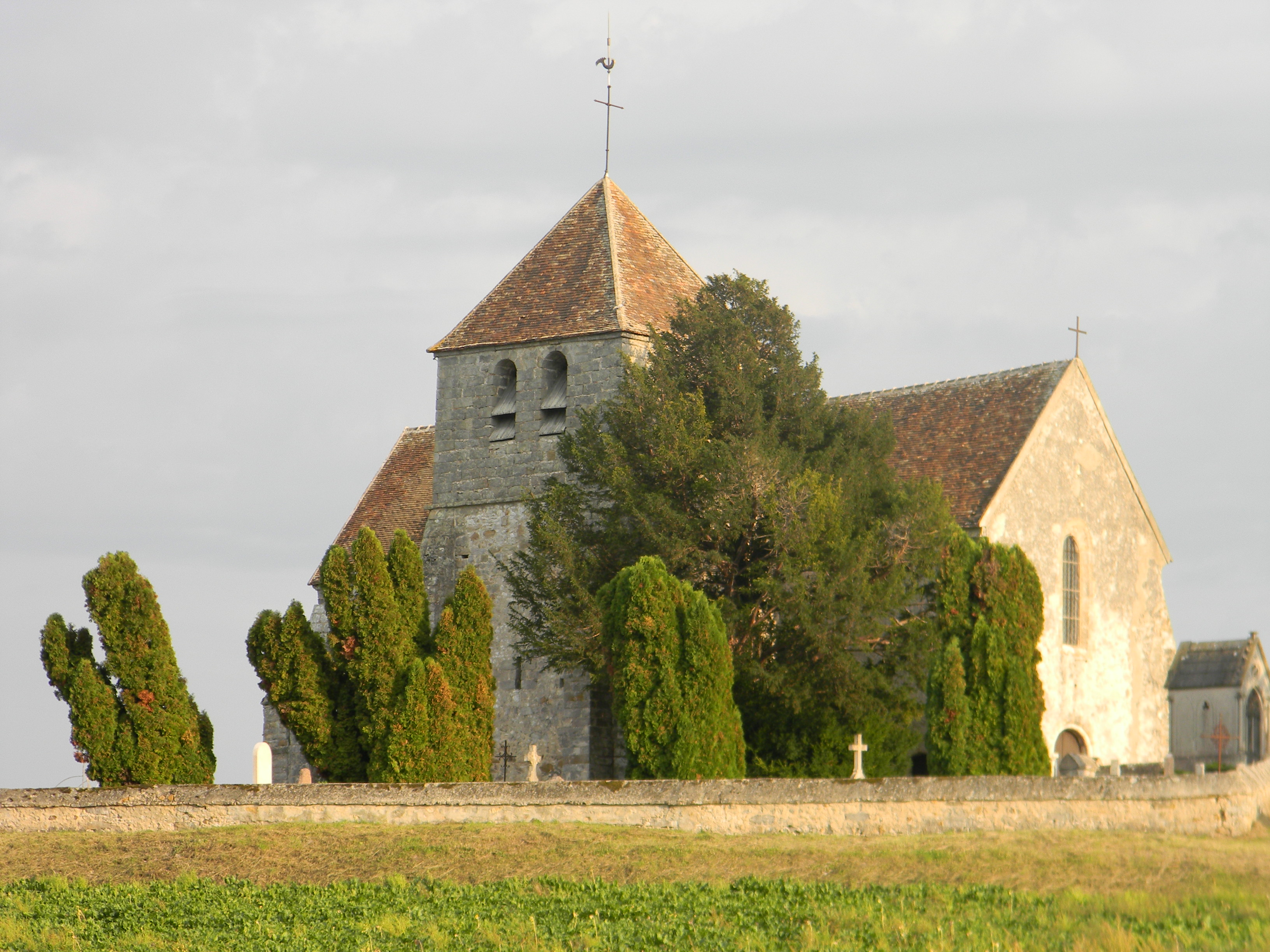 Eglise Saint-Martin de La Genevraye (Seine-et-Marne, France)) .